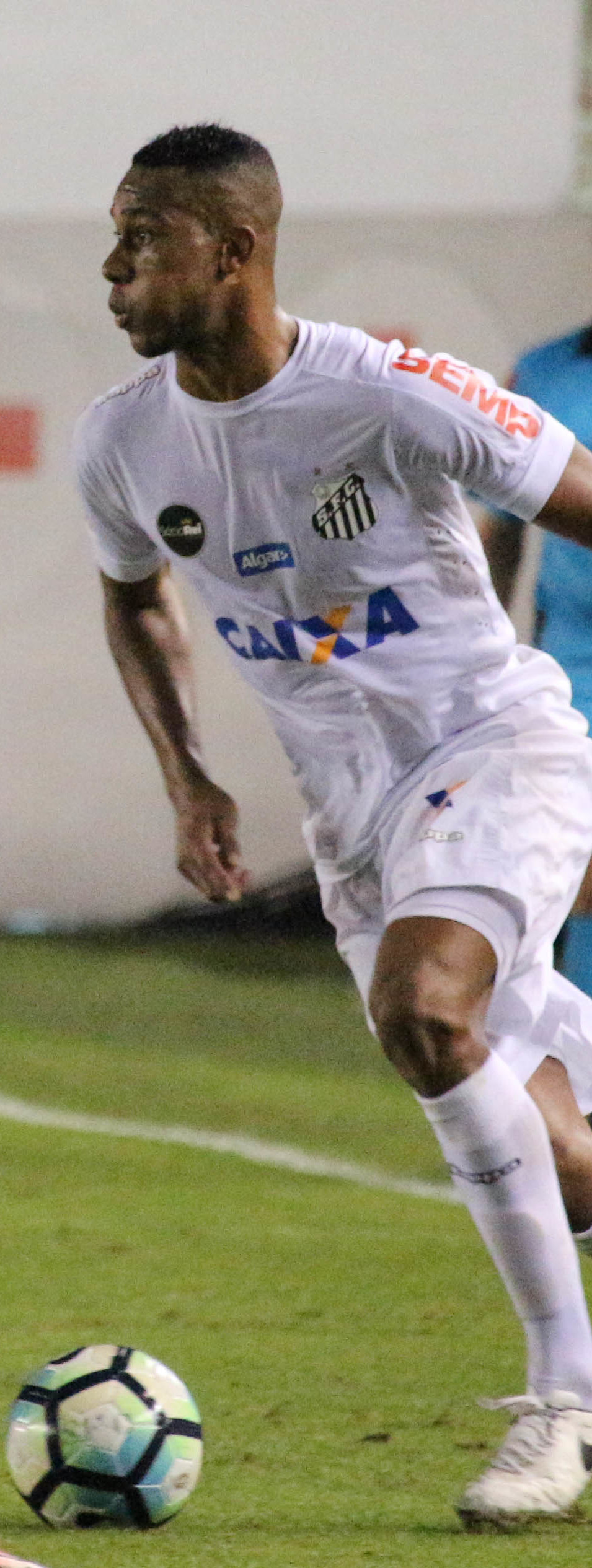 Foto: Douglas Teixeira/Futebol Santista